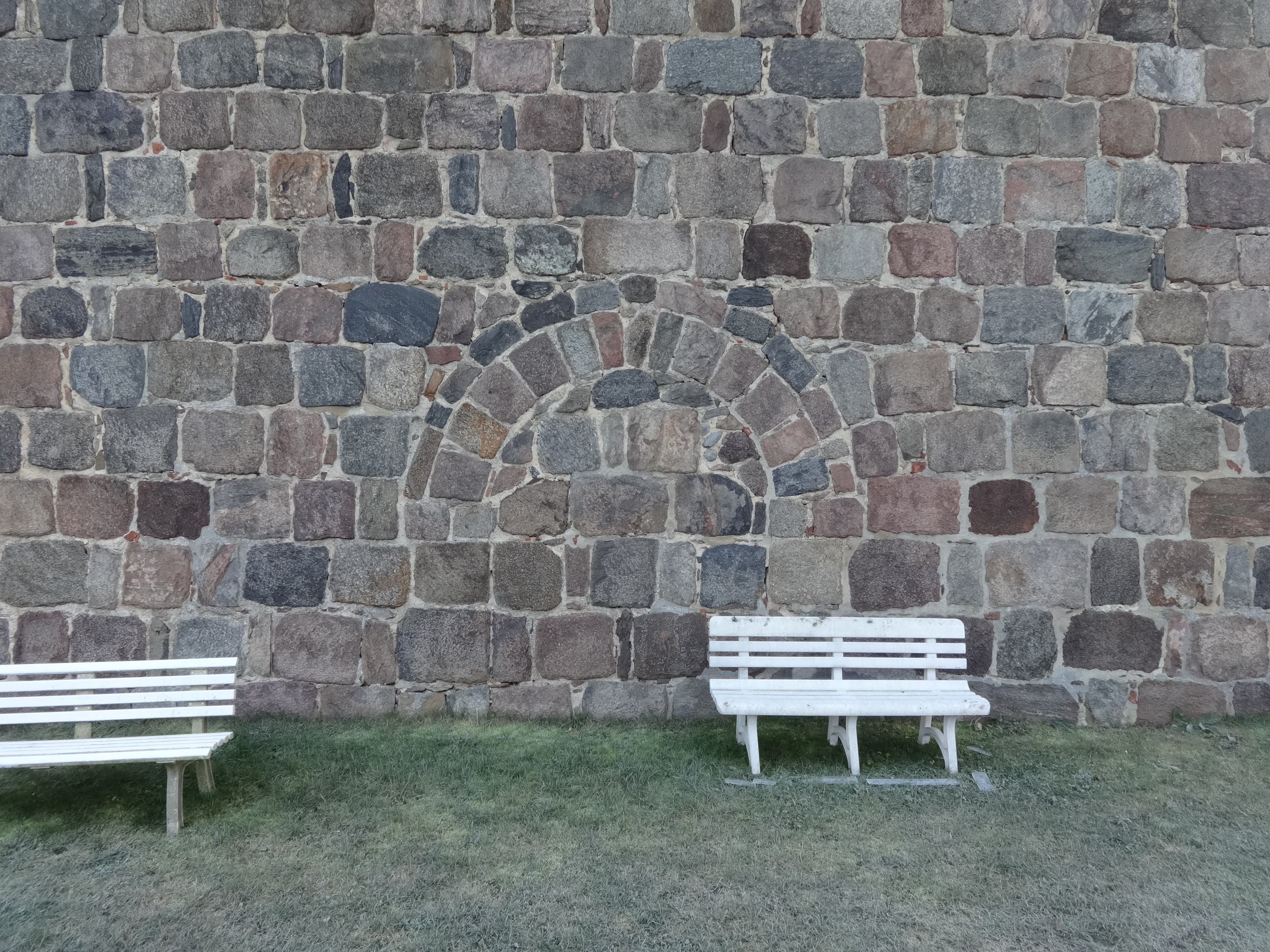 Die Feldsteinkirche in Neuheim in Jüterbog entstand vermutlich in der ersten Hälfte des 13. Jahrhunderts. Sie wird im 21. Jahrhundert als Feierhalle genutzt. Im Innern befinden sich Grabplatten der Pastoren Wolfgang Schmidt (gestorben 1663) und von Johann Friedrich Ulrich mit Ehefrau (gestorben 1737).